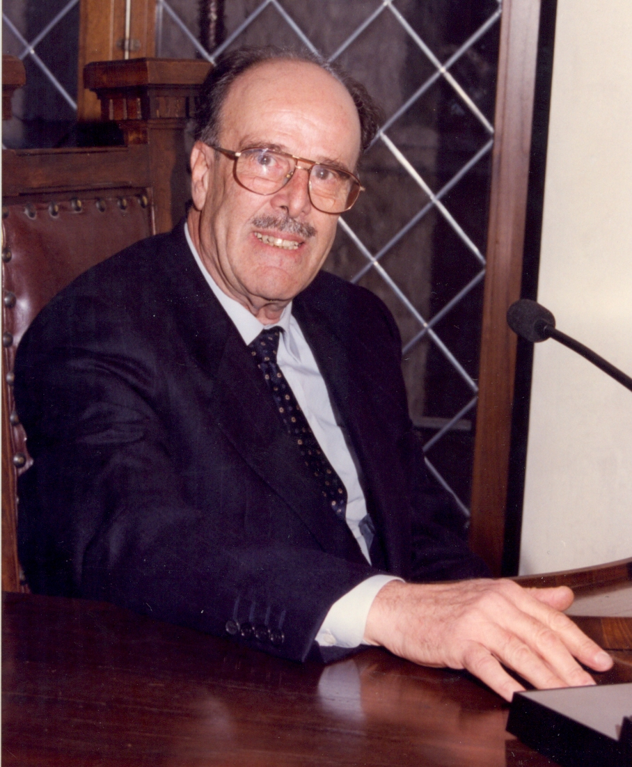 Giorgio Bargioni interviene all'Accademia dei Georgofili, 1997